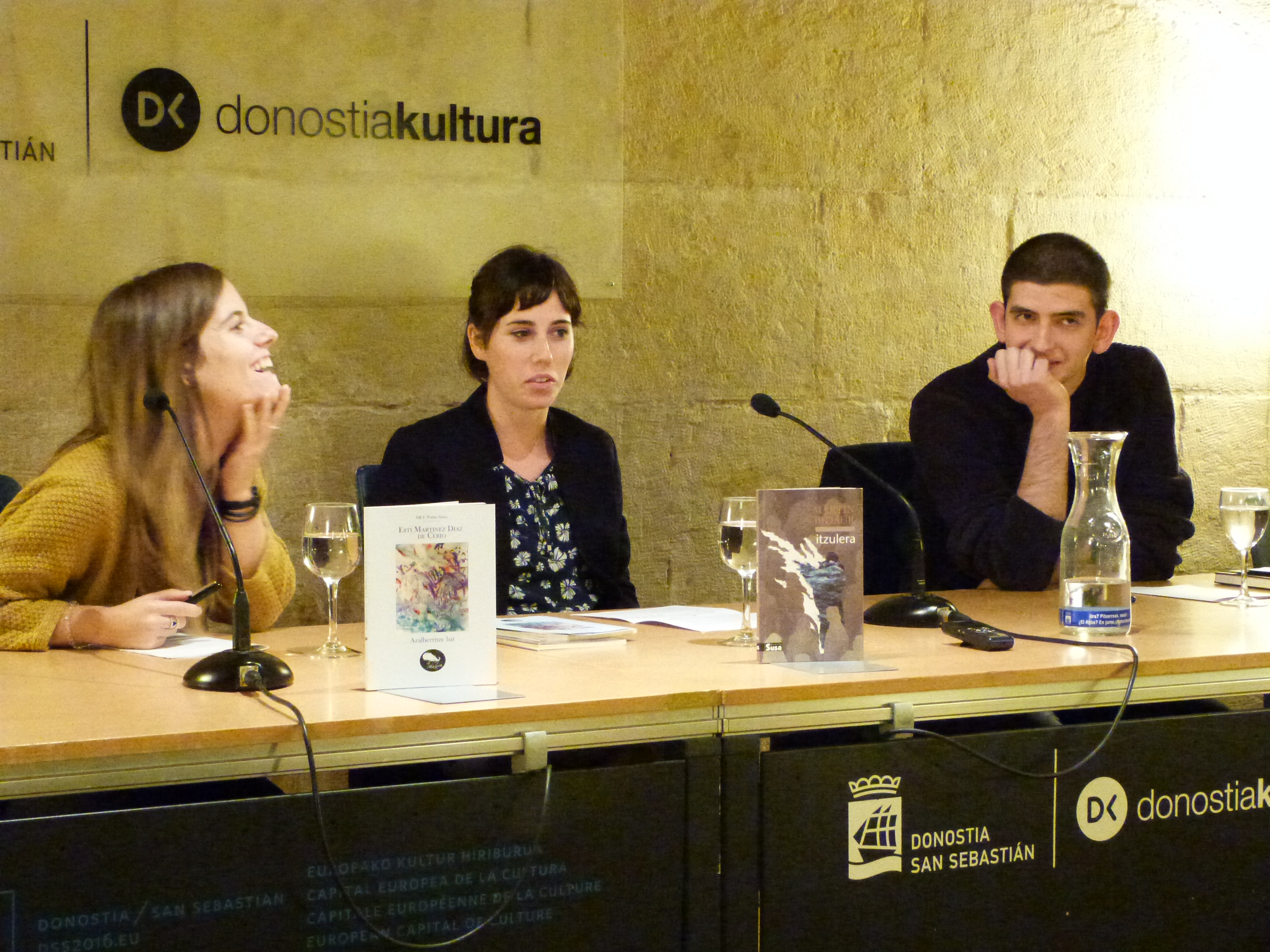 Literaktum jaialdiko argazkia